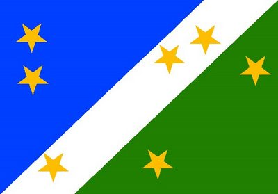 Bandeira do Município de São Gonçalo do Amarante, estado do Ceará, Brasil.